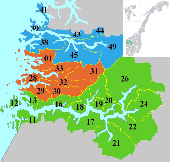 Sogn og Fjordane Fylke has 26 Municipalitys,Put 14 in front of the nr on the map and you have the official nr of that Municipality. Sogn og Fjordane Fylke har 26 kommuner. 14 foran nr på kartet gir det offesielle kommunenr.(td har den sørlegste kommunen Aurland nr 1421).(14 er Sogn og Fjordane Fylke sitt nr)